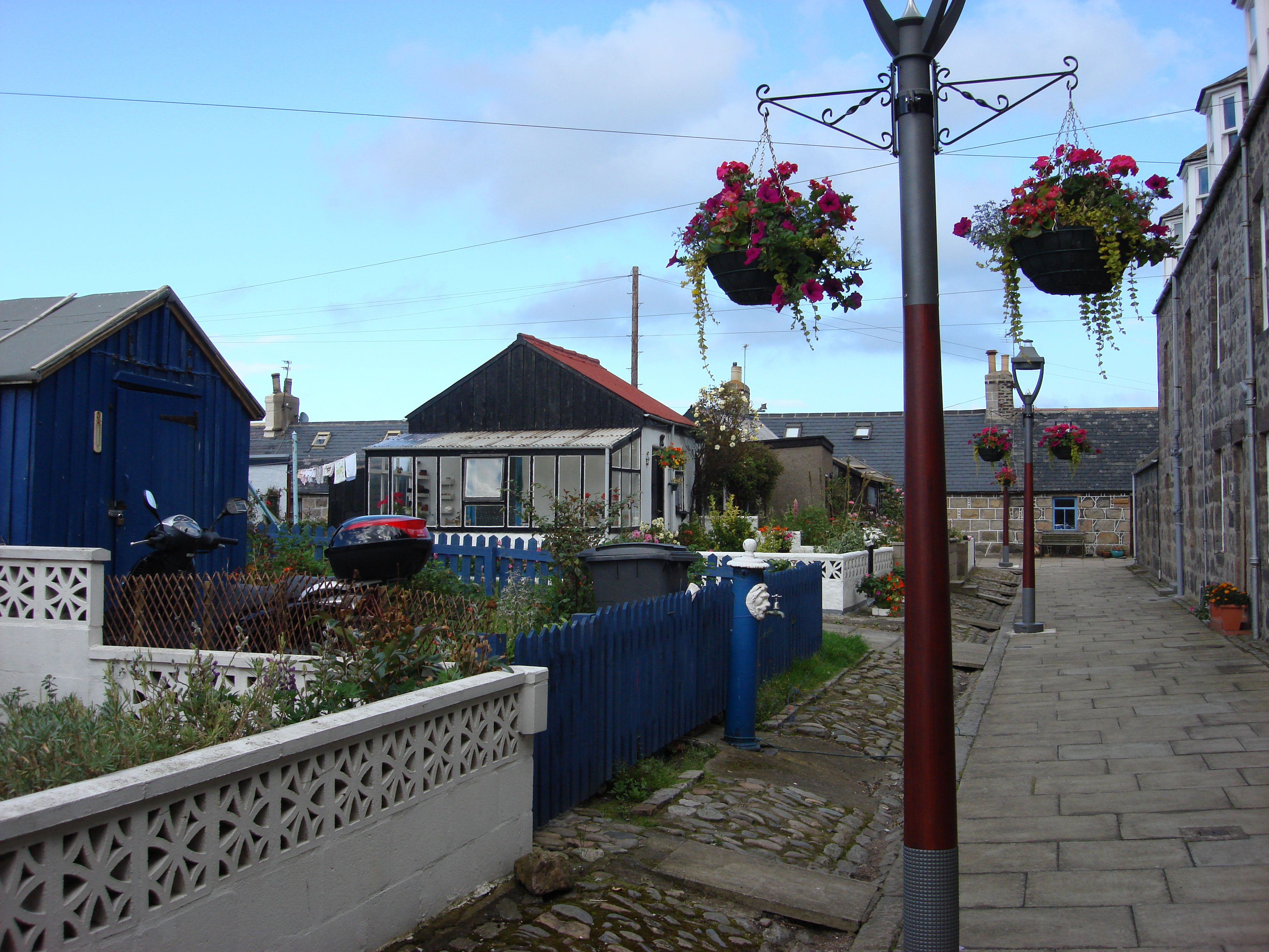 Nice road in Footdee, Aberdeen, Scotland